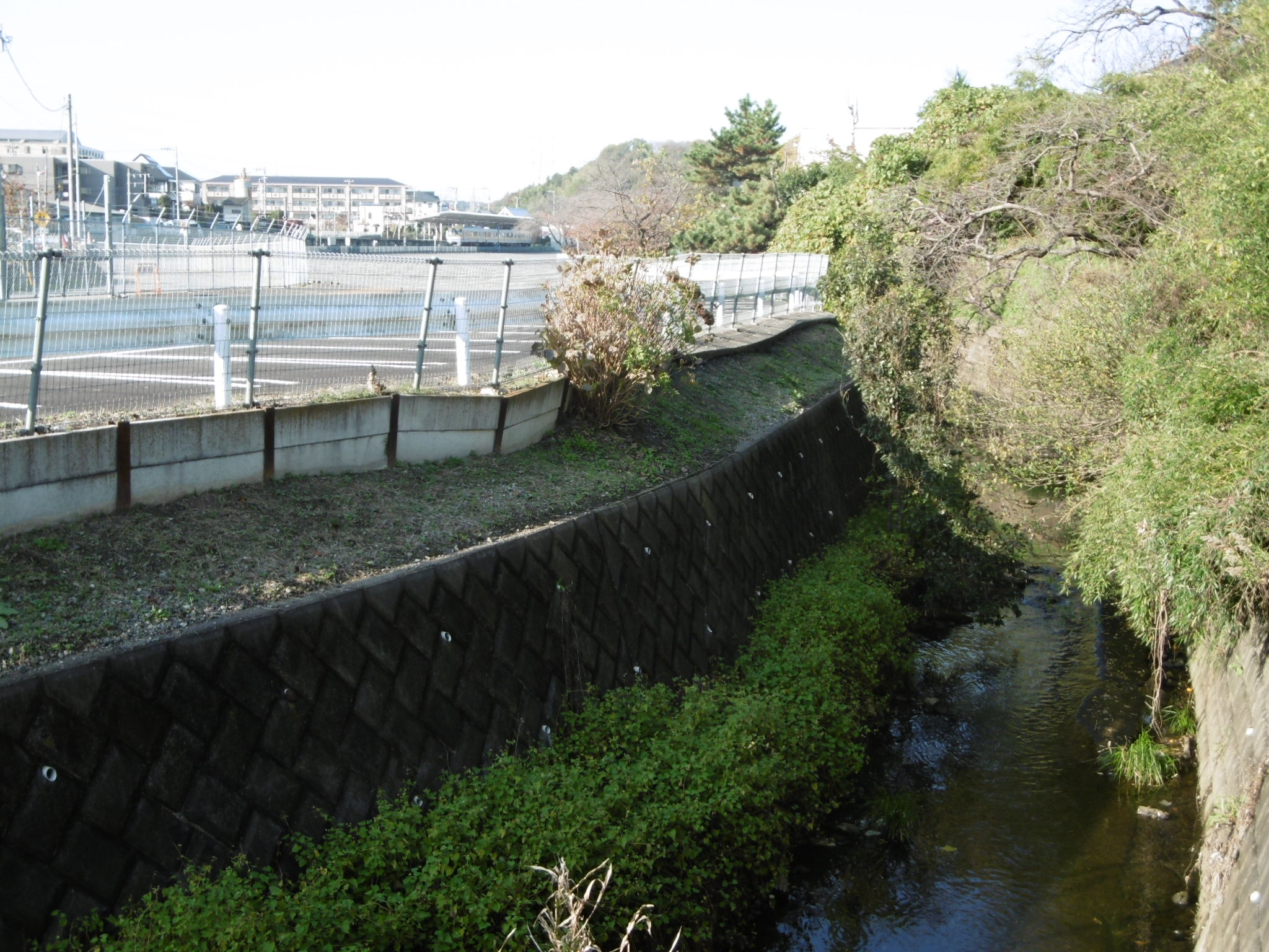 横浜市青葉区内を流れる奈良川。左上奥に見えるこどもの国駅(こどもの国線)の側から流れてゆく。